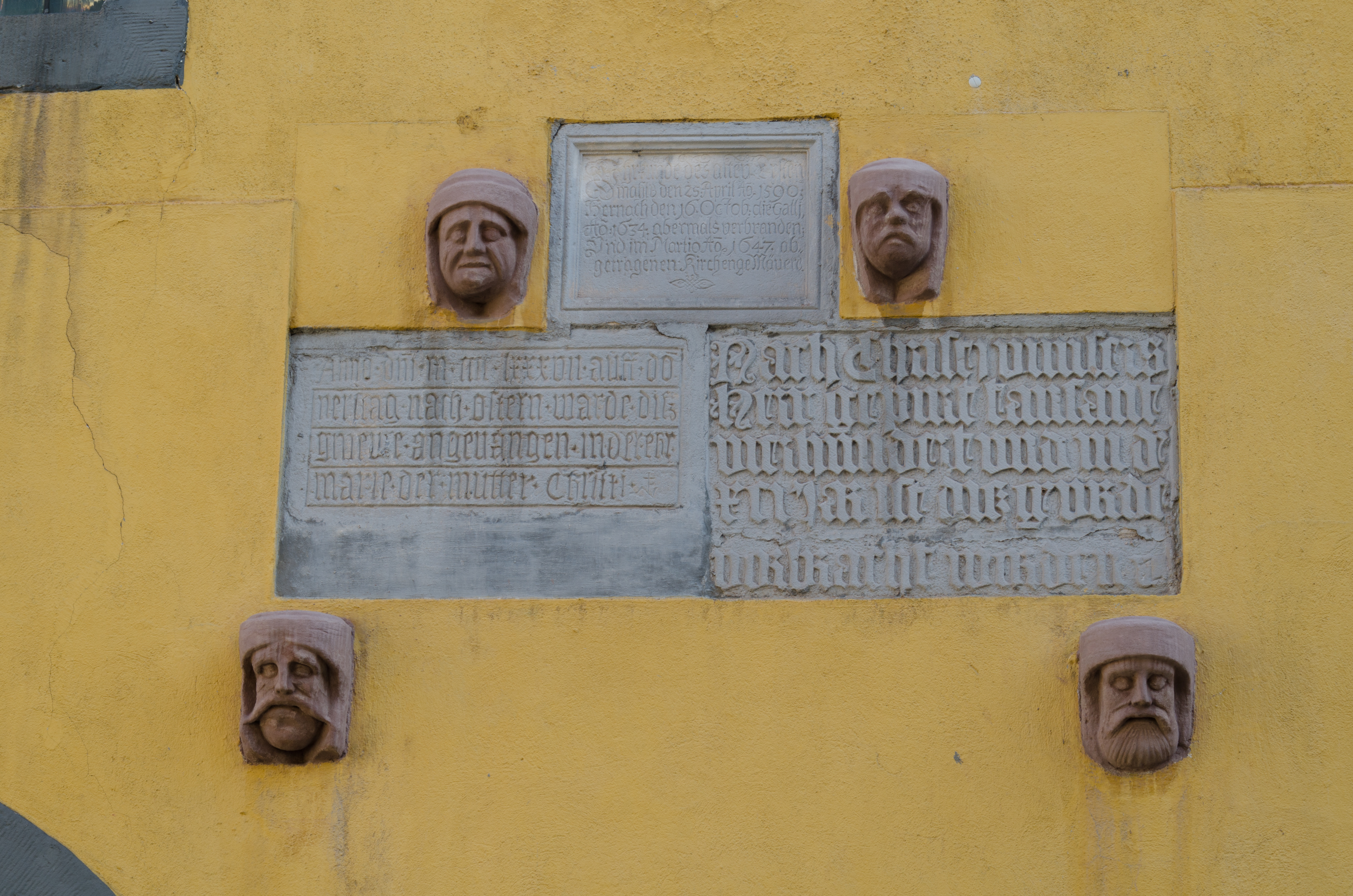 Suhl, Marienkirche